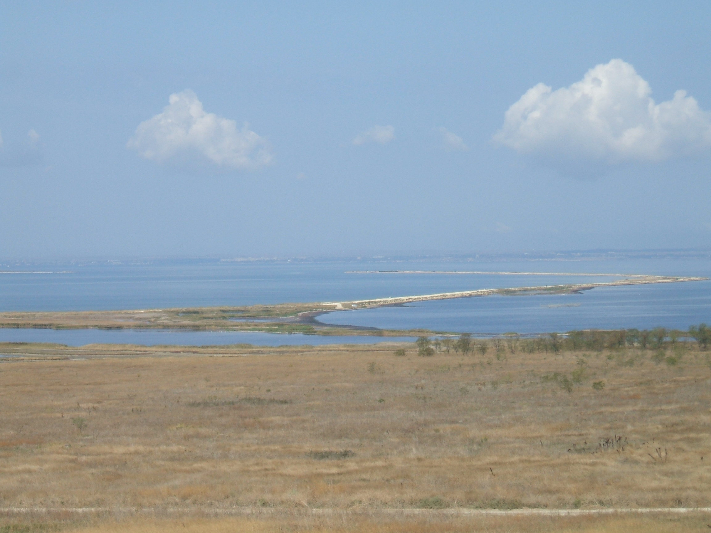 дамба на мысе Тузла под Таманью